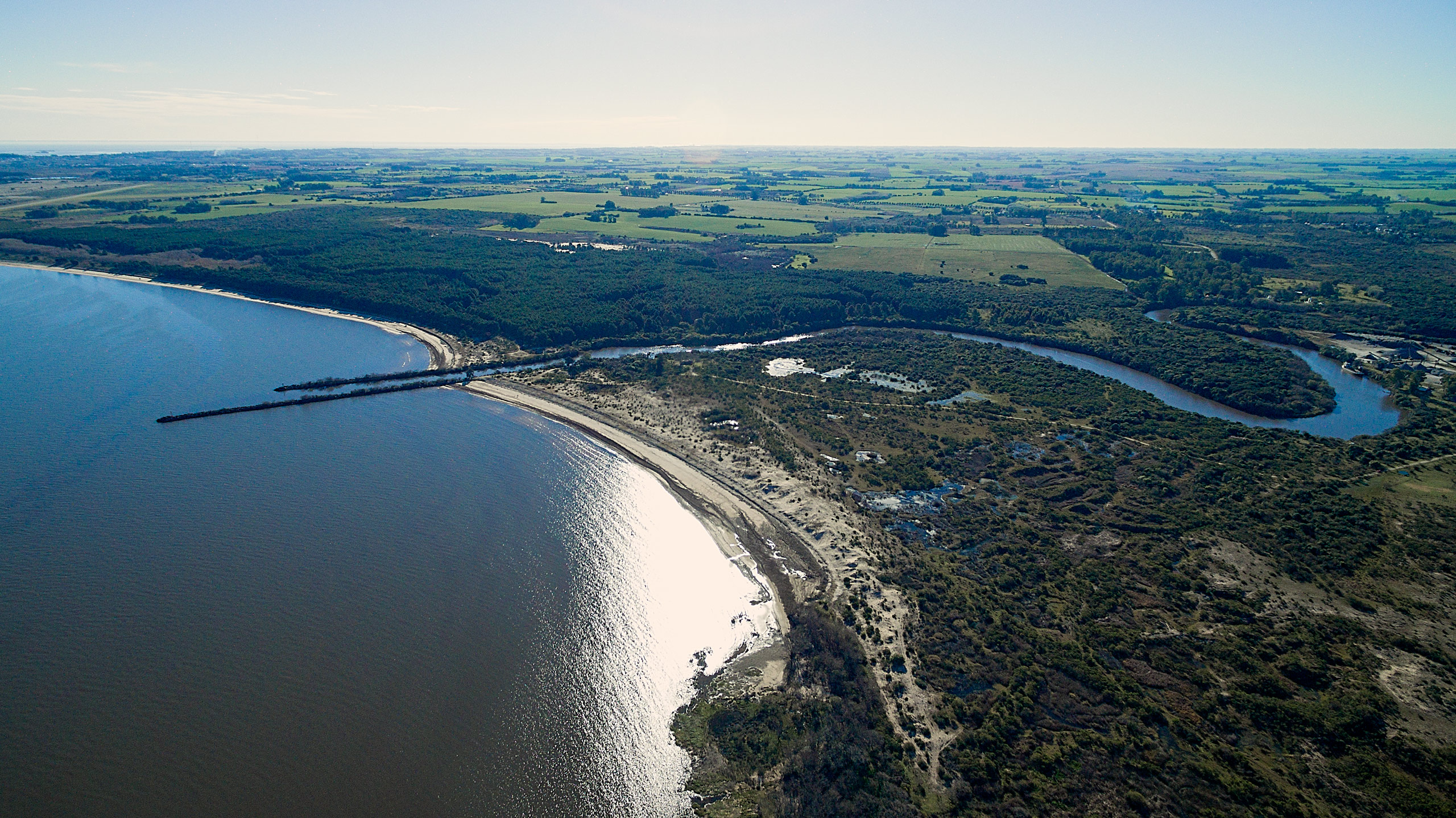 Playa del Riachuelo